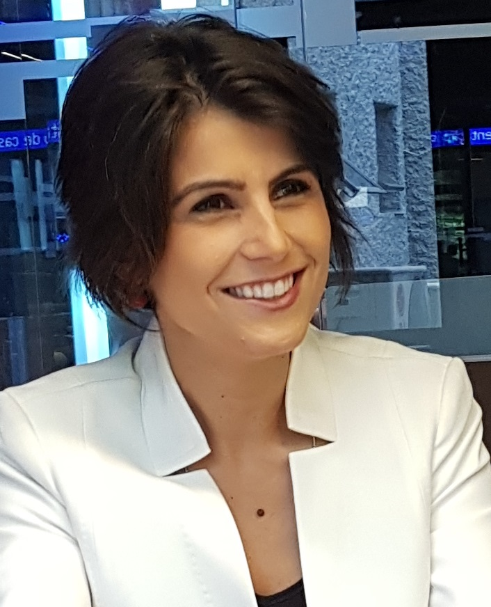 Manuela d'Ávila em dezembro de 2017.